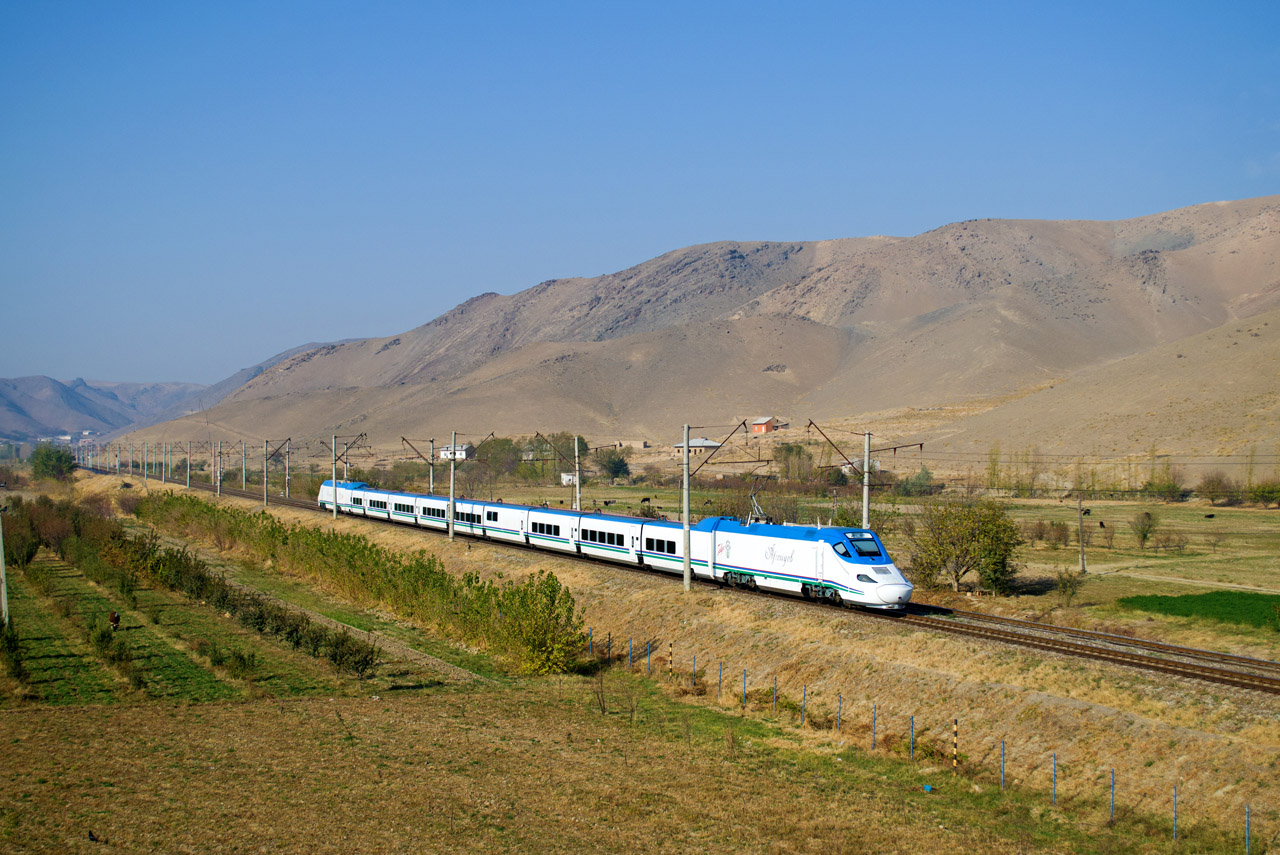 Talgo 250 Afrosiyob 03-04